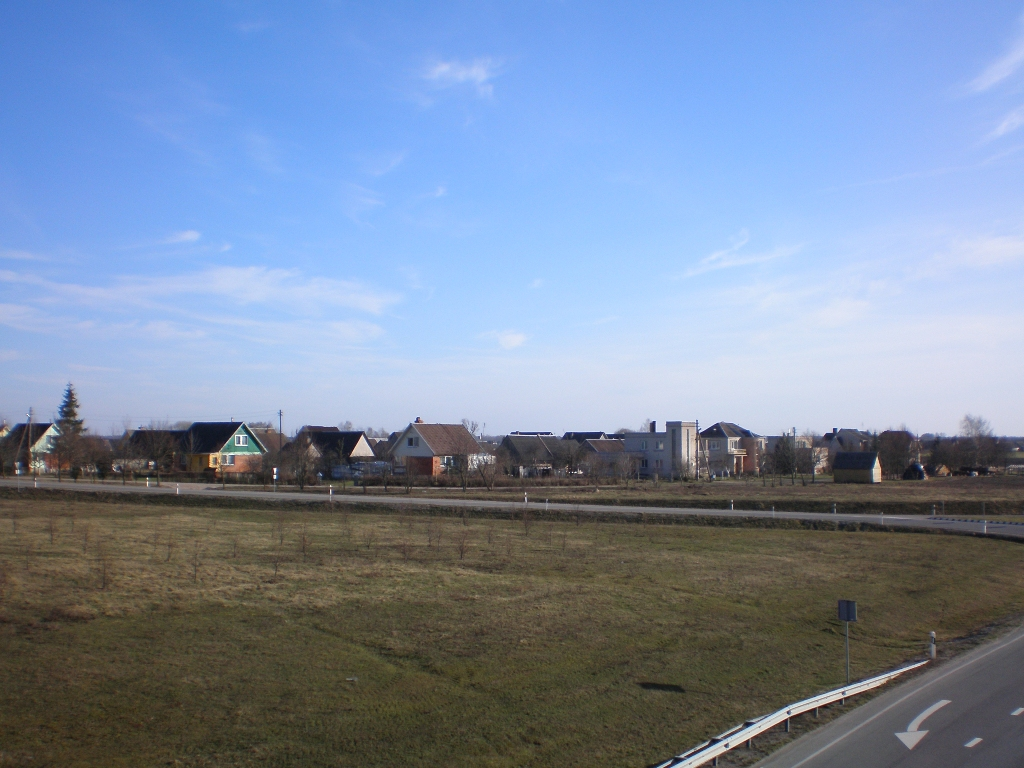 Nociūnai, Kėdainių r. 2007.03.26 Foto: Hugo.arg